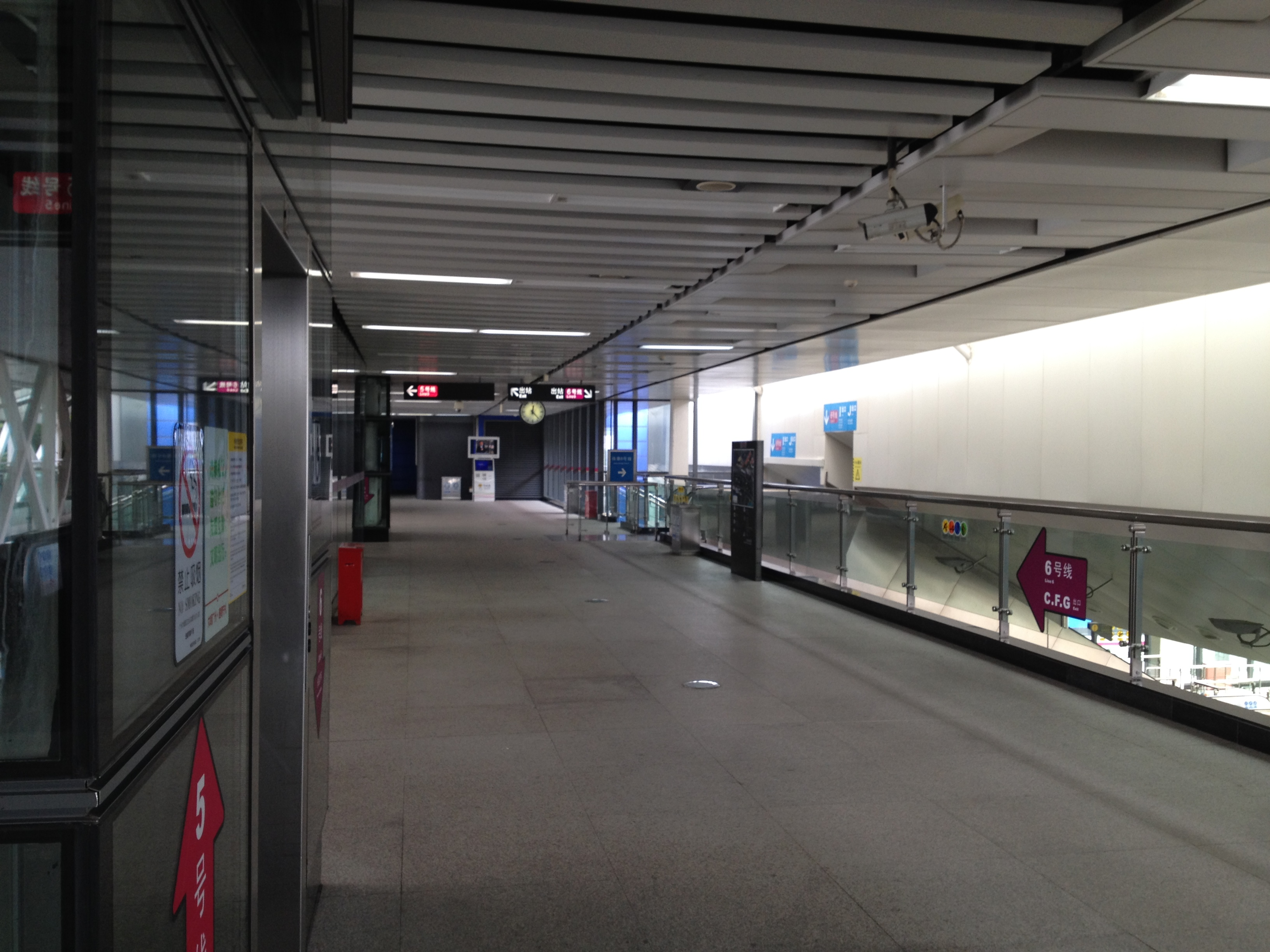 广州地铁坦尾站位于地上二层的站厅